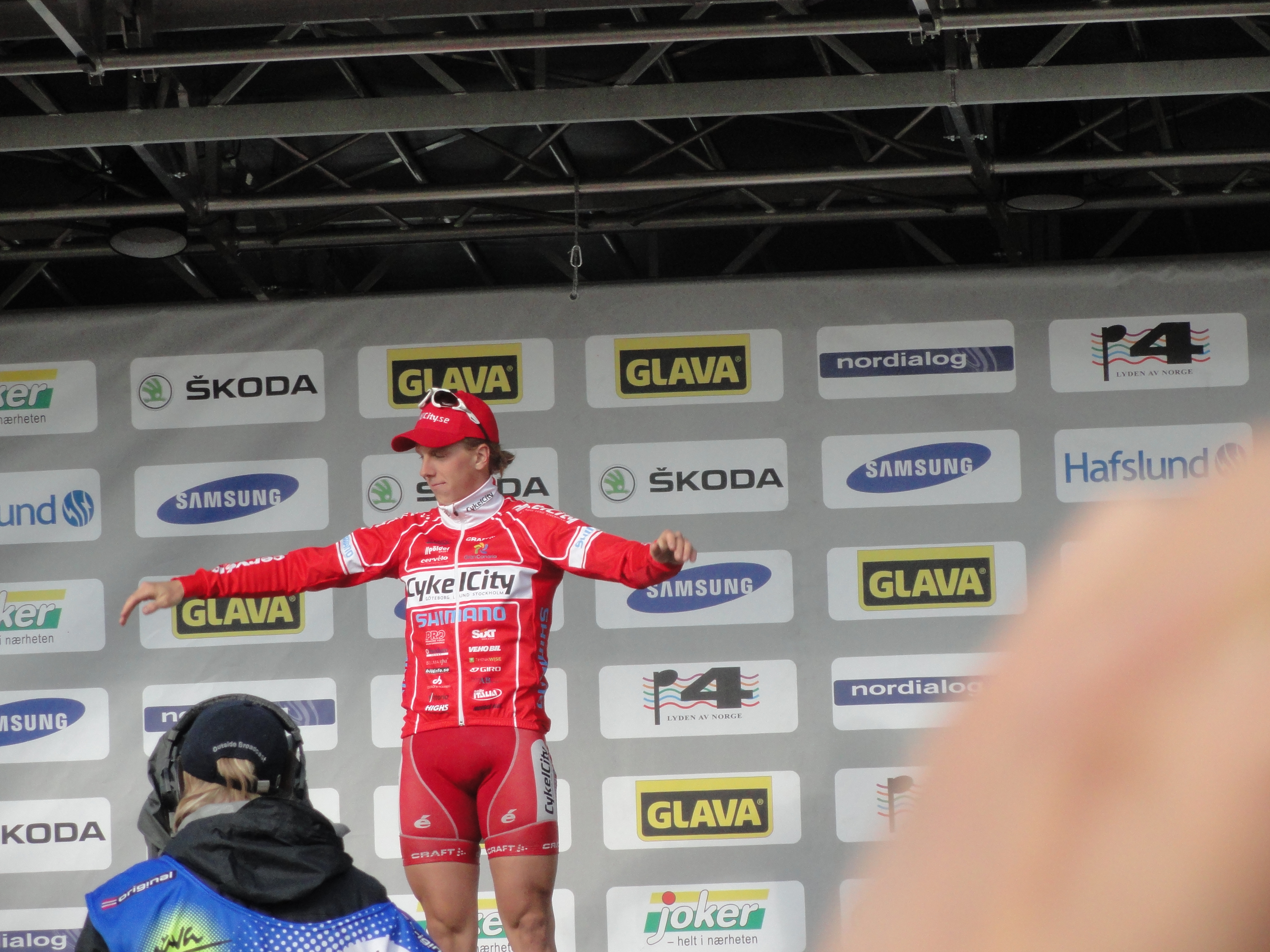 Jonas Ahlstrand på podiet i Glava Tour.